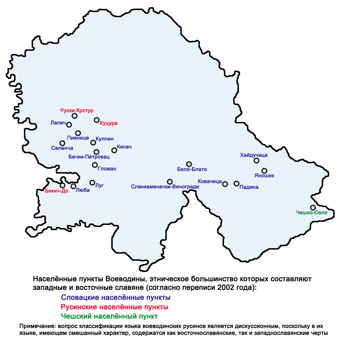 Населённые пункты Воеводины со словацким, русинским и чешским этническим большинством (согласно переписи 2002 года)